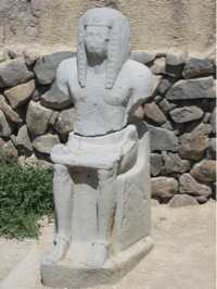 Ramzes III.